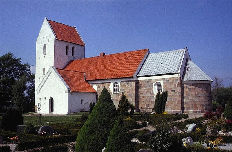 Kobberup Kirke, set fra sydøst